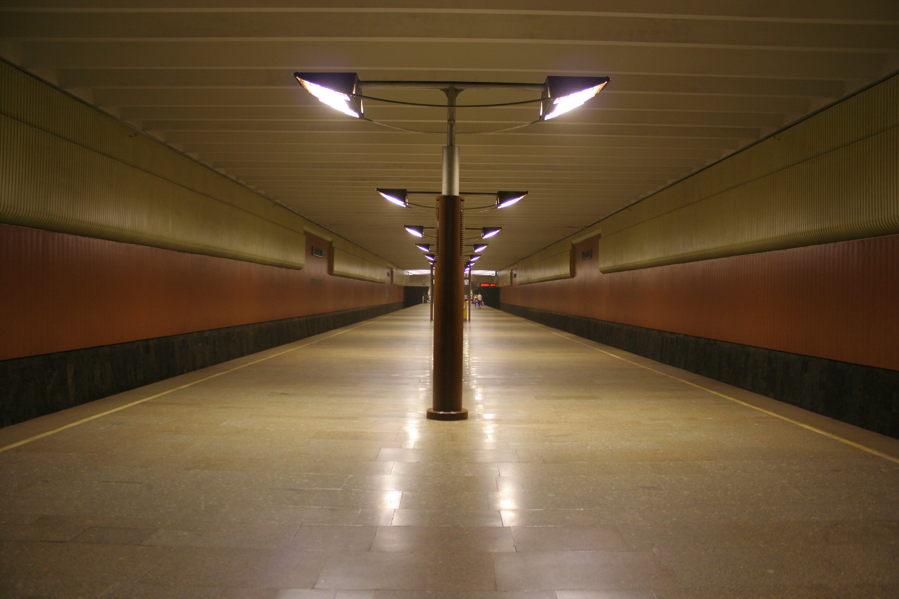 U-Bahnhof Wolschskaja der Metro Moskau.